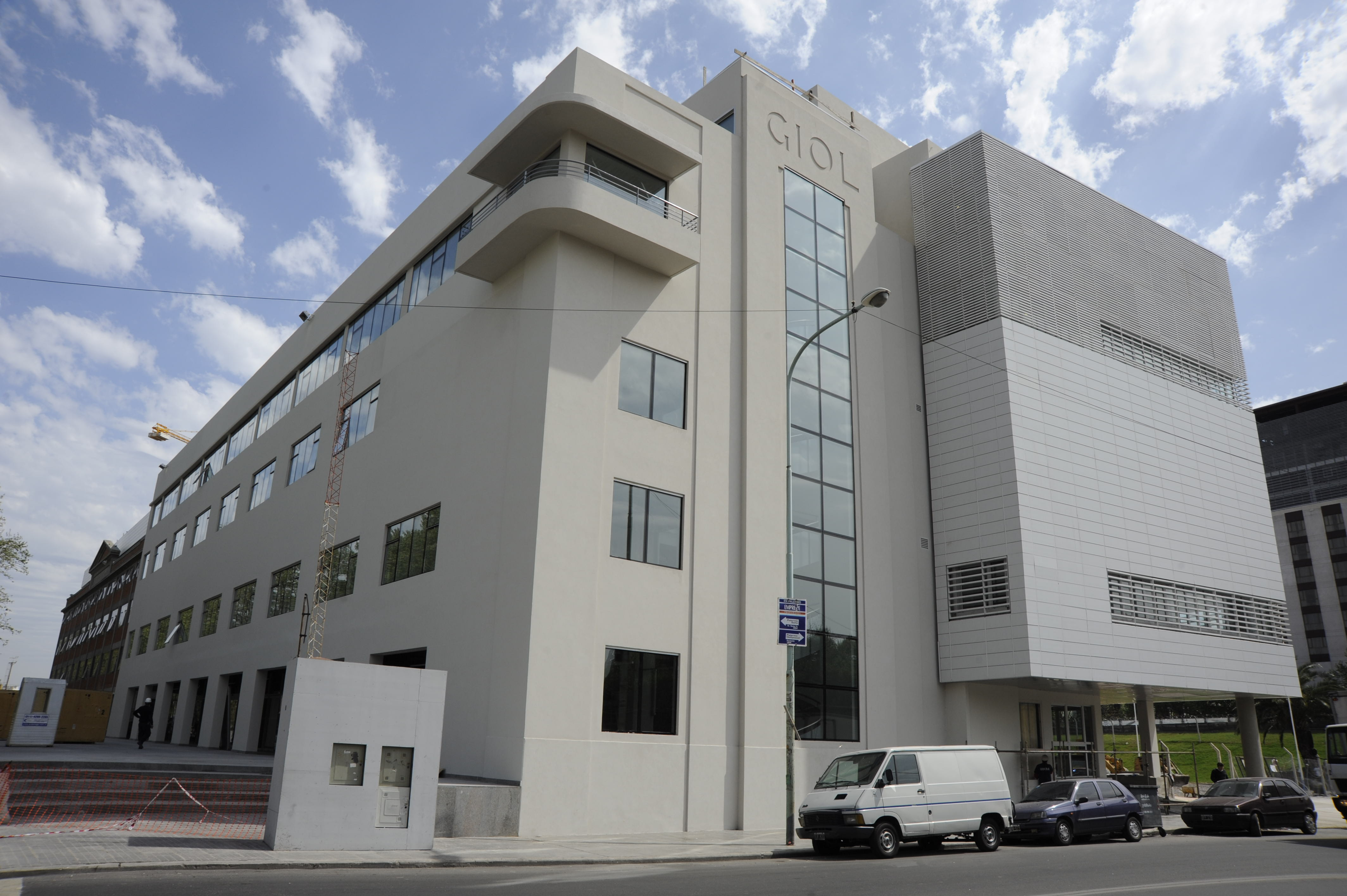 Vista lateral del Polo Científico Tecnológico días previos a la inauguración de la primera etapa.